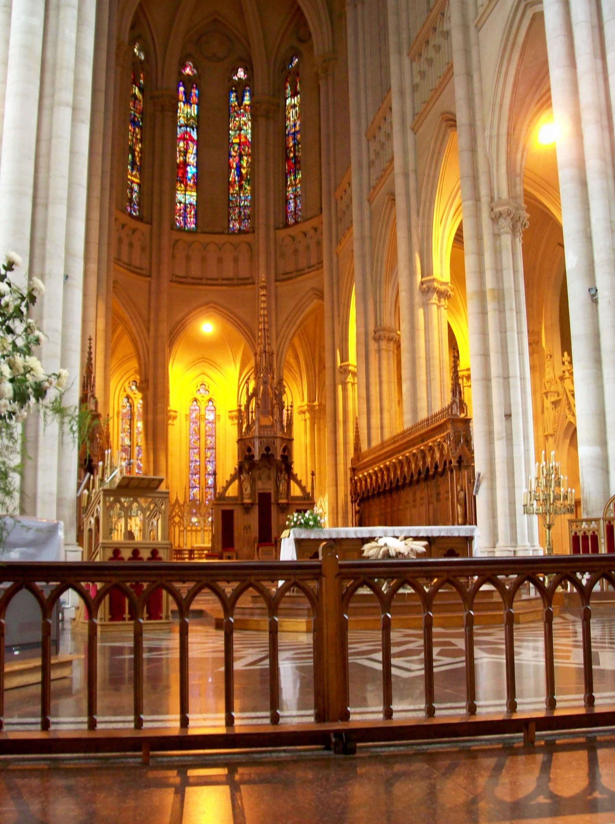 Interior de la Catedral de La Plata, en la Provincia de Buenos Aires, Argentina.